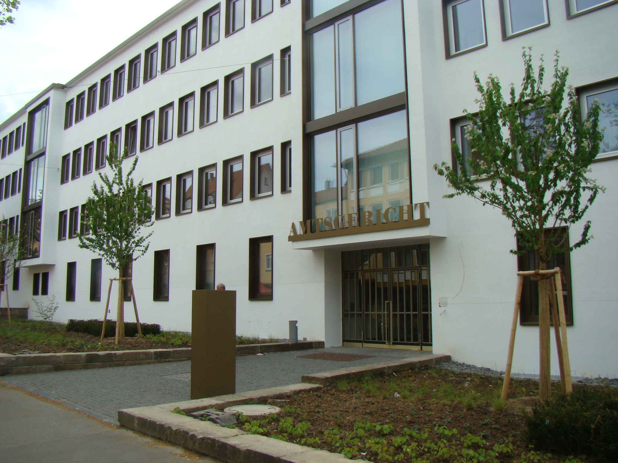 Heilbronn, Amtsgerichtsgebäude, Wilhelmstraße